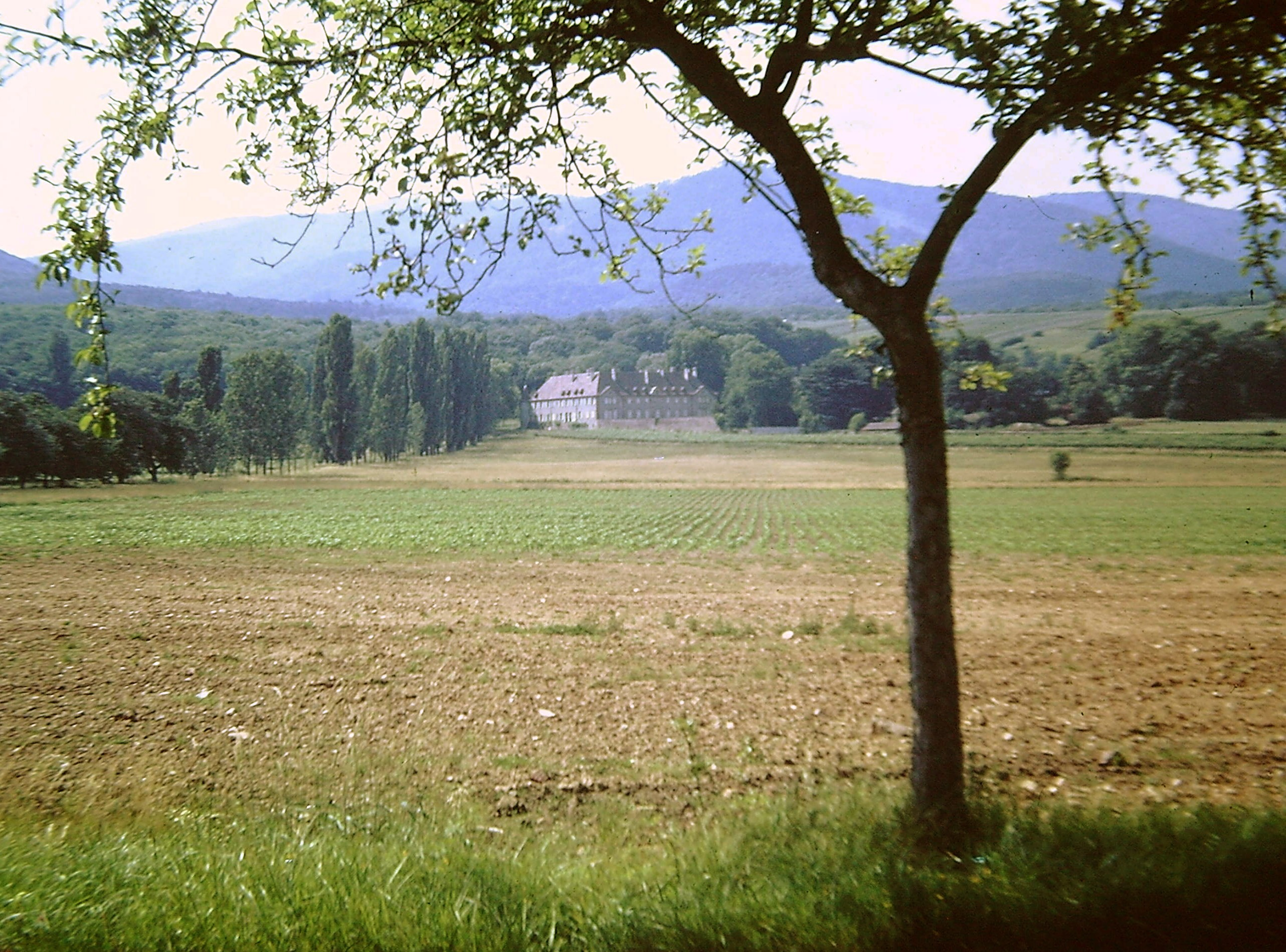 Château d'Ollwiler